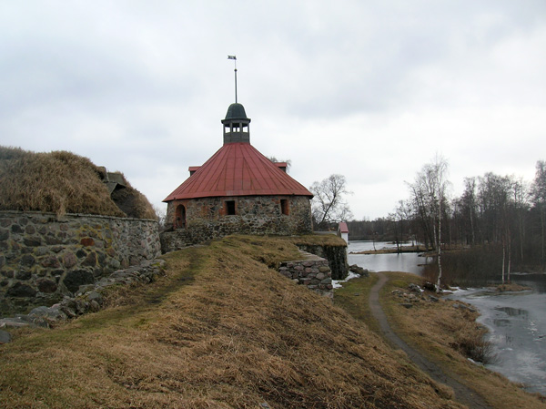 Medieval Korela fortress in Priozersk, Russia.